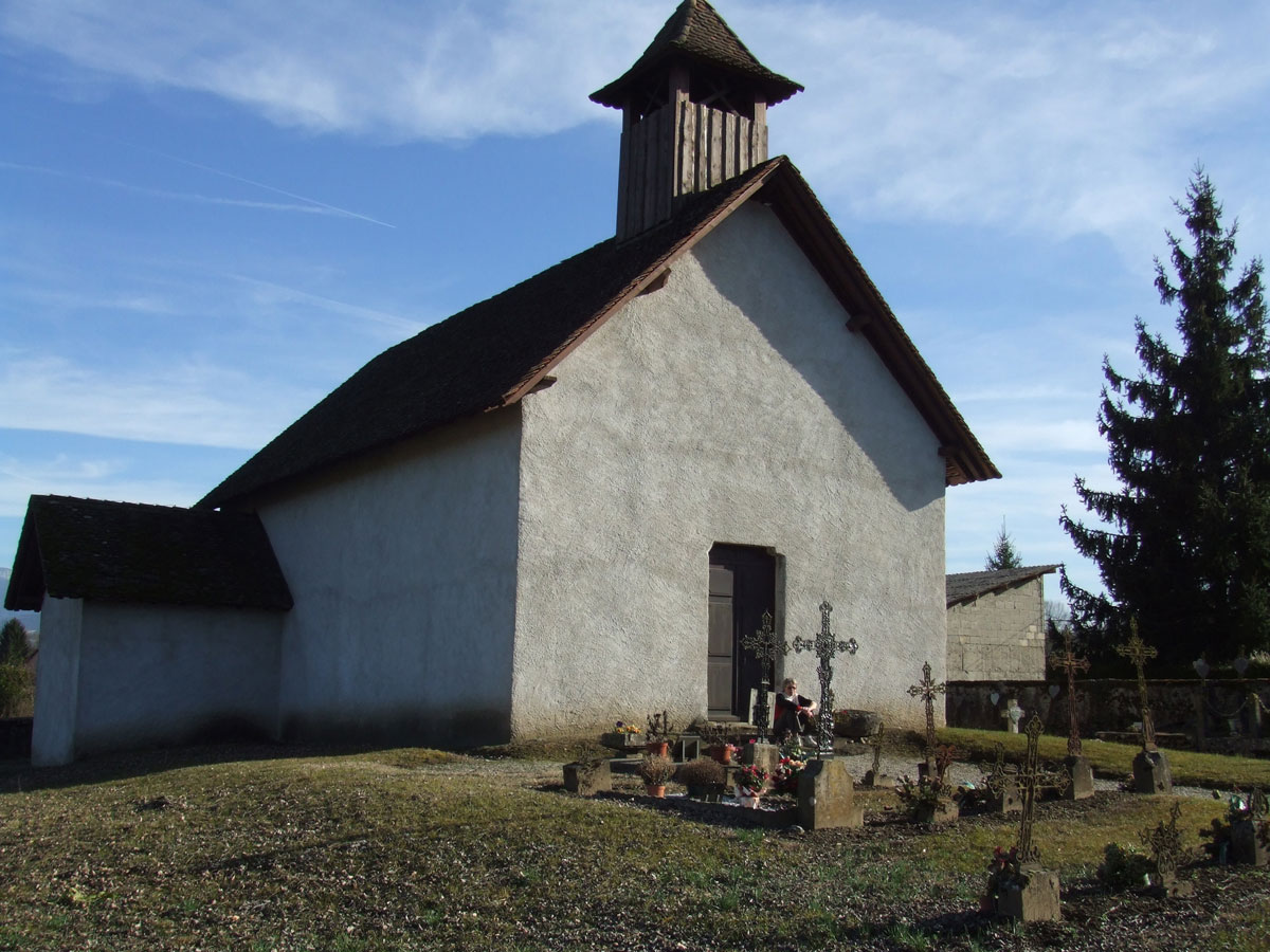 Chapelle d'Avaux sur le territoire de Romagnieu en Rhône-Alpes (France)